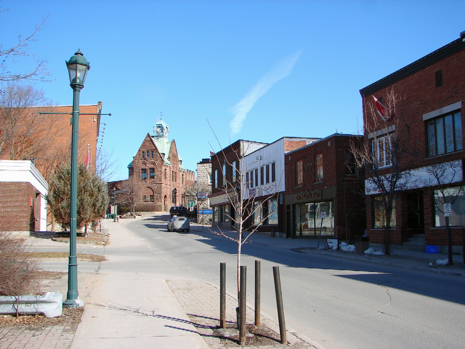 Almonte, Ontario, Canada